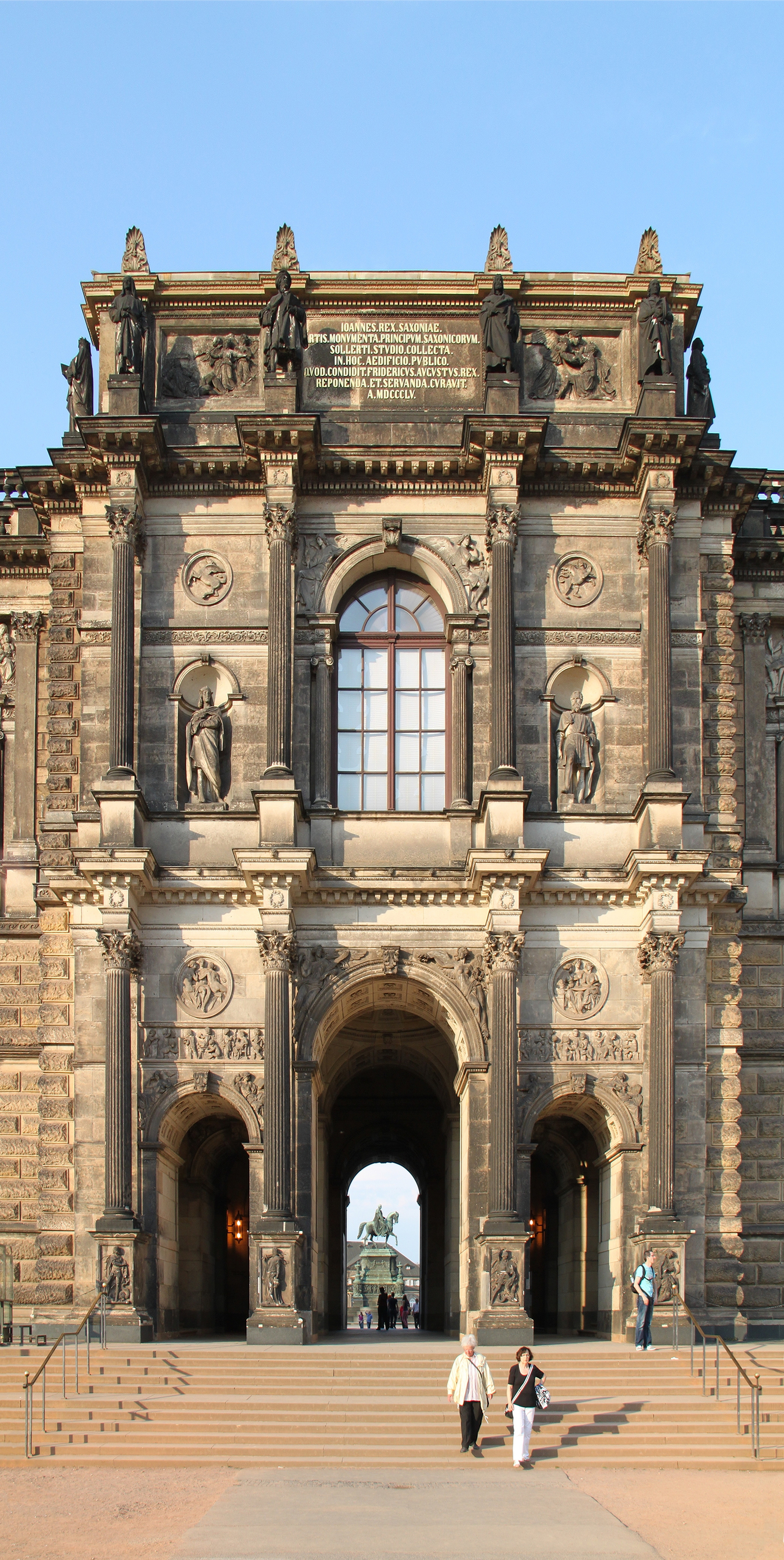 Sempergalerie in Dresden